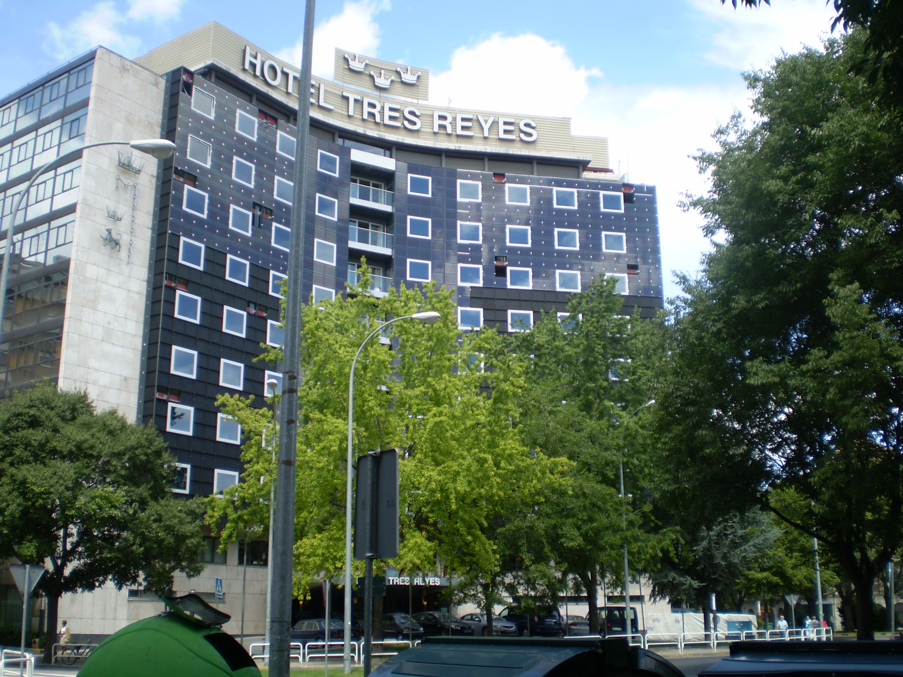 Hotel Tres Reyes en Pamplona (Navarra-España)